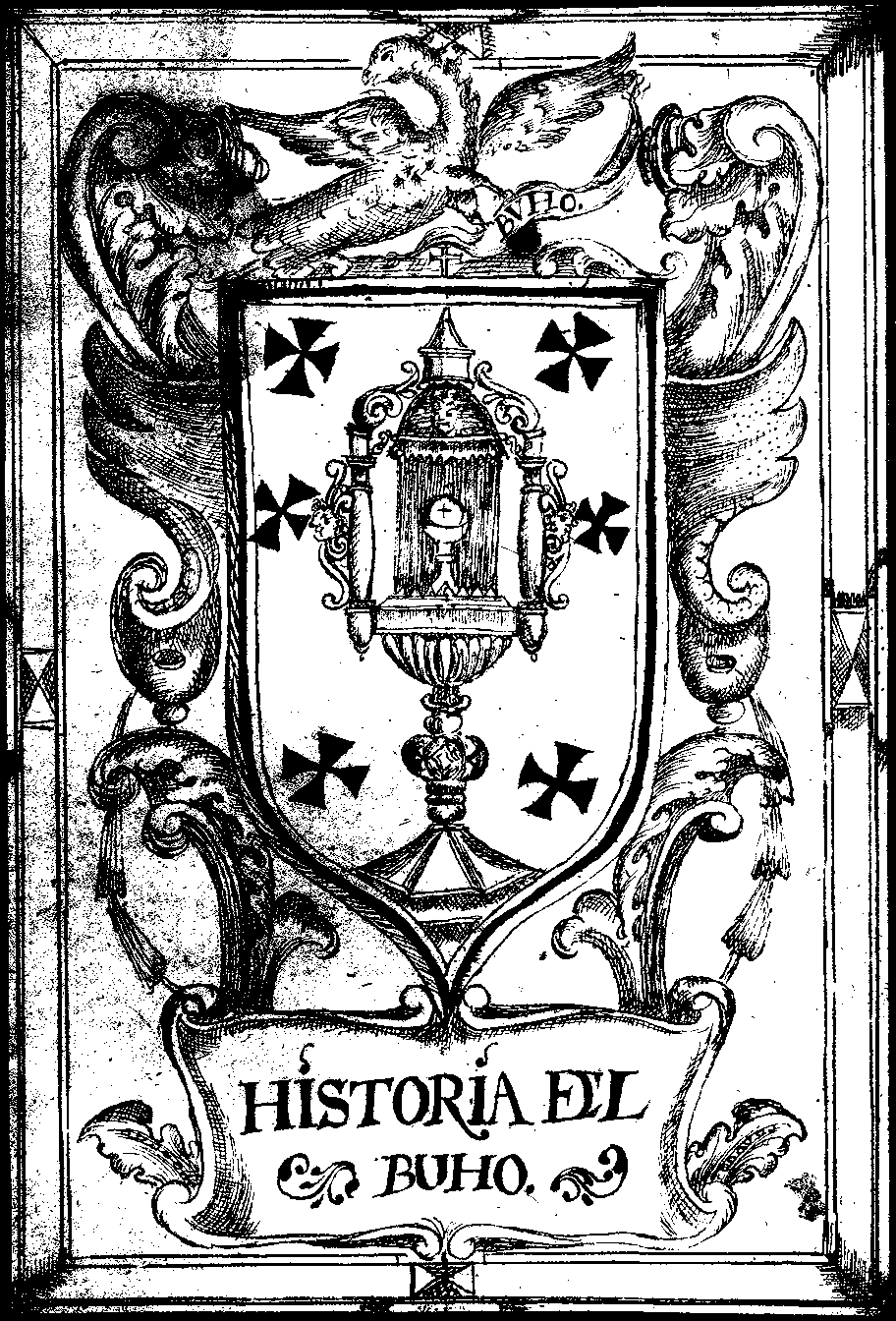 Historia del buho de Pedro Fernández de Castro, VII conde de Lemos, coñecido coma o Gran Conde de Lemos.